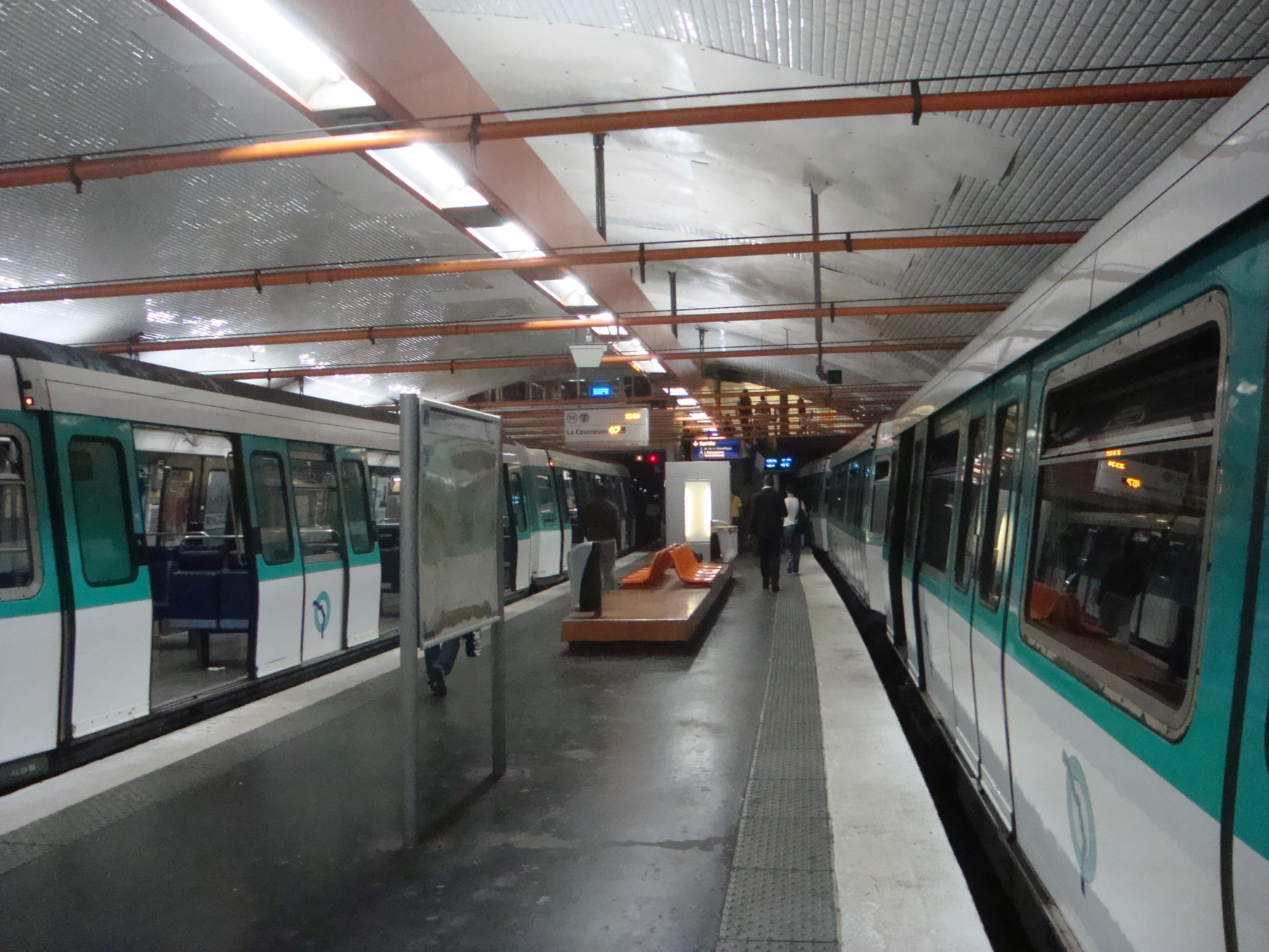 Quais de la station Mairie d'Ivry sur la ligne 7 du métro parisien.